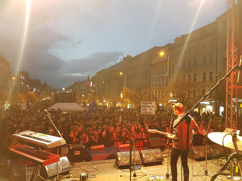 I Love You Honey Bunny na Václavském náměstí 17. listopadu